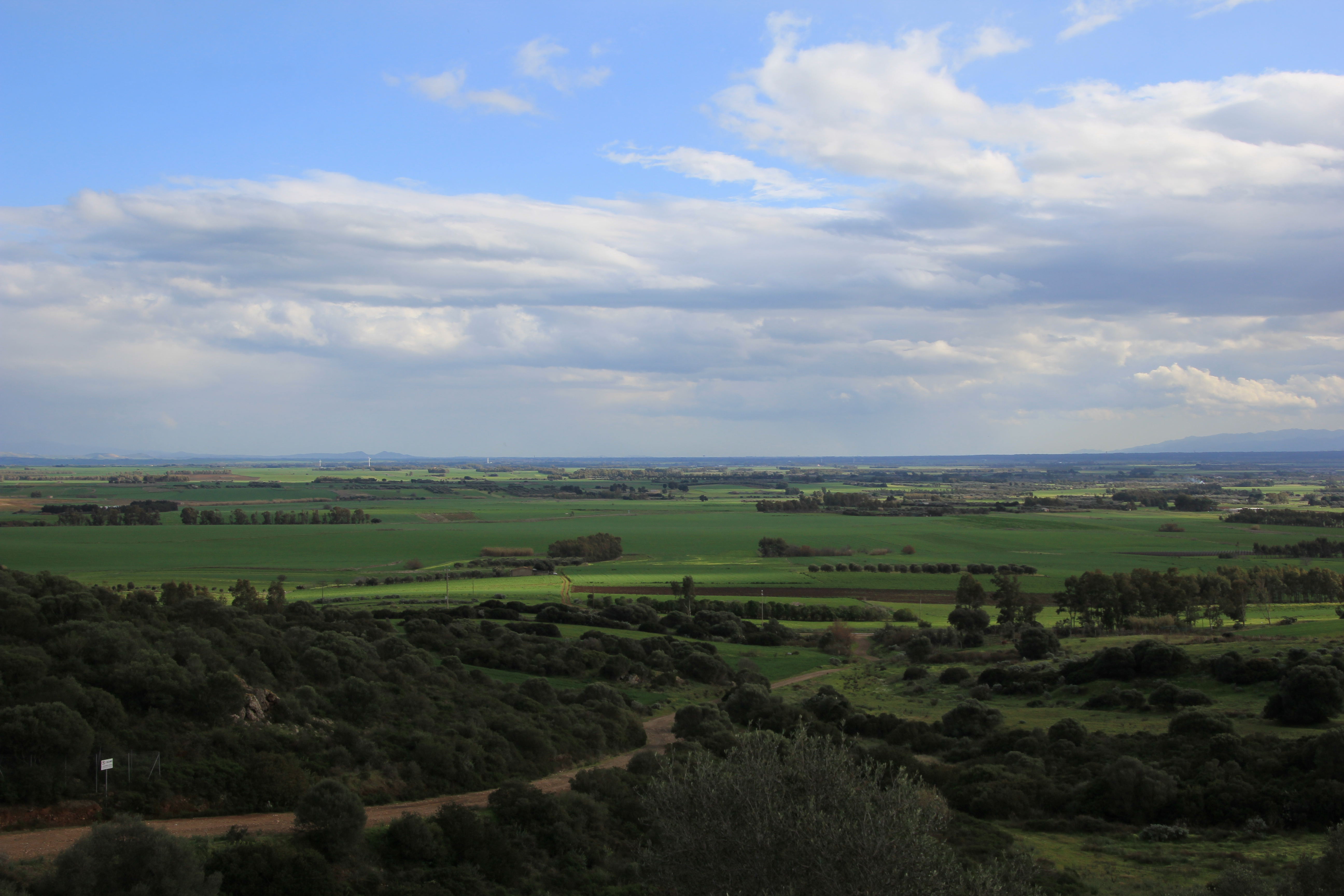 Campidano di Cagliari